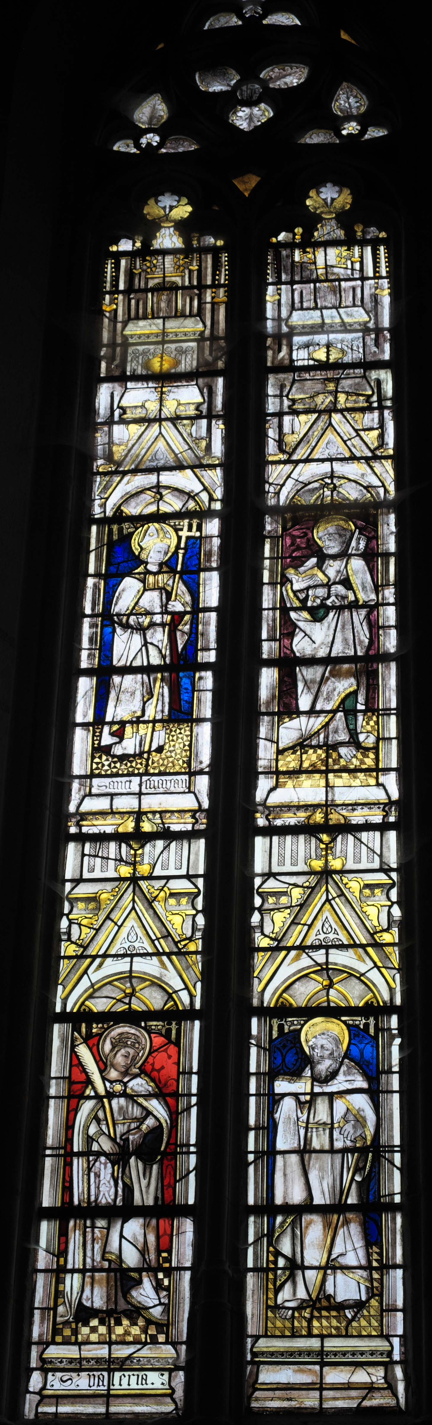 Stiftskirche Saint-Étienne in Eymoutiers im Département Haute-Vienne (Nouvelle-Aquitaine/Frankreich), Bleiglasfenster (Nr. 8) aus dem 15. Jahrhundert, Darstellung: Heilige Valeria (unten links), heiliger Antonius (unten rechts), heiliger Martial von Limoges (oben links), Apostel Petrus (oben rechts)